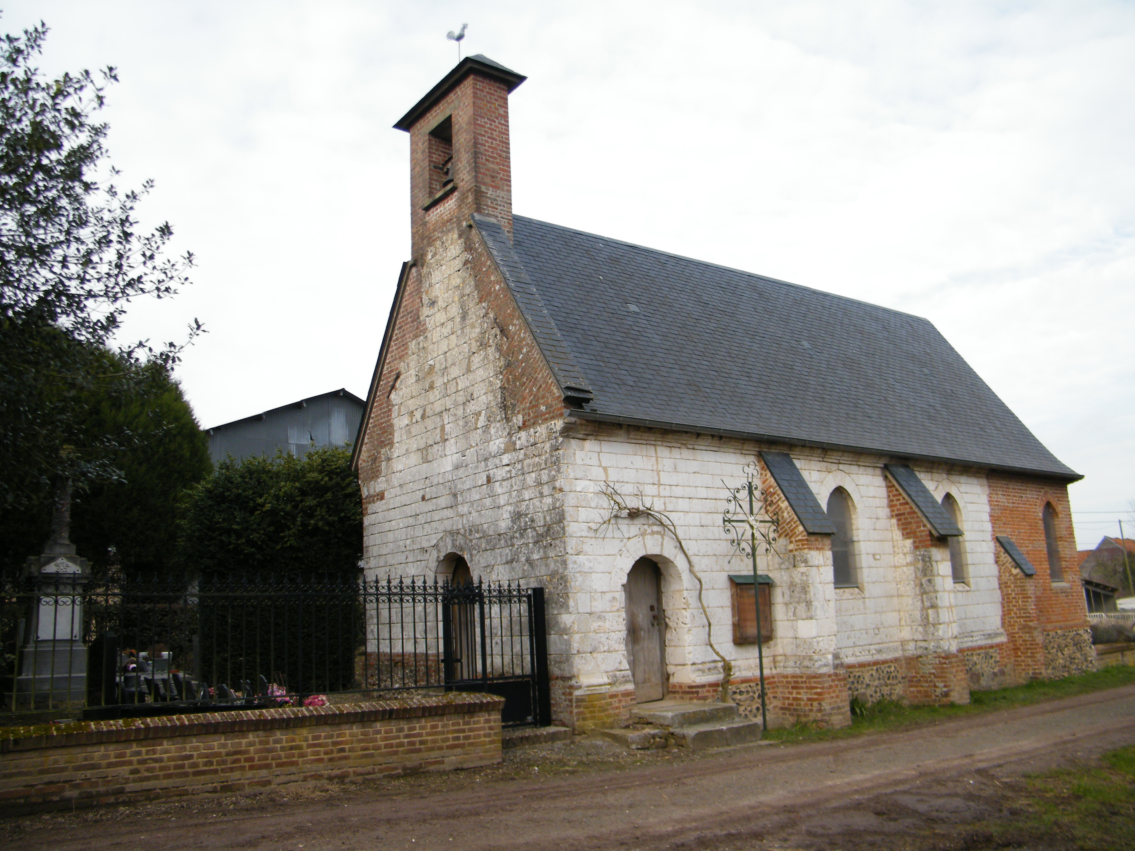 L'église Saint-Claude.